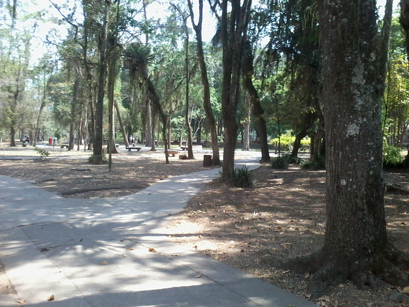 Português do Brasil: Pindamonhangaba - SP